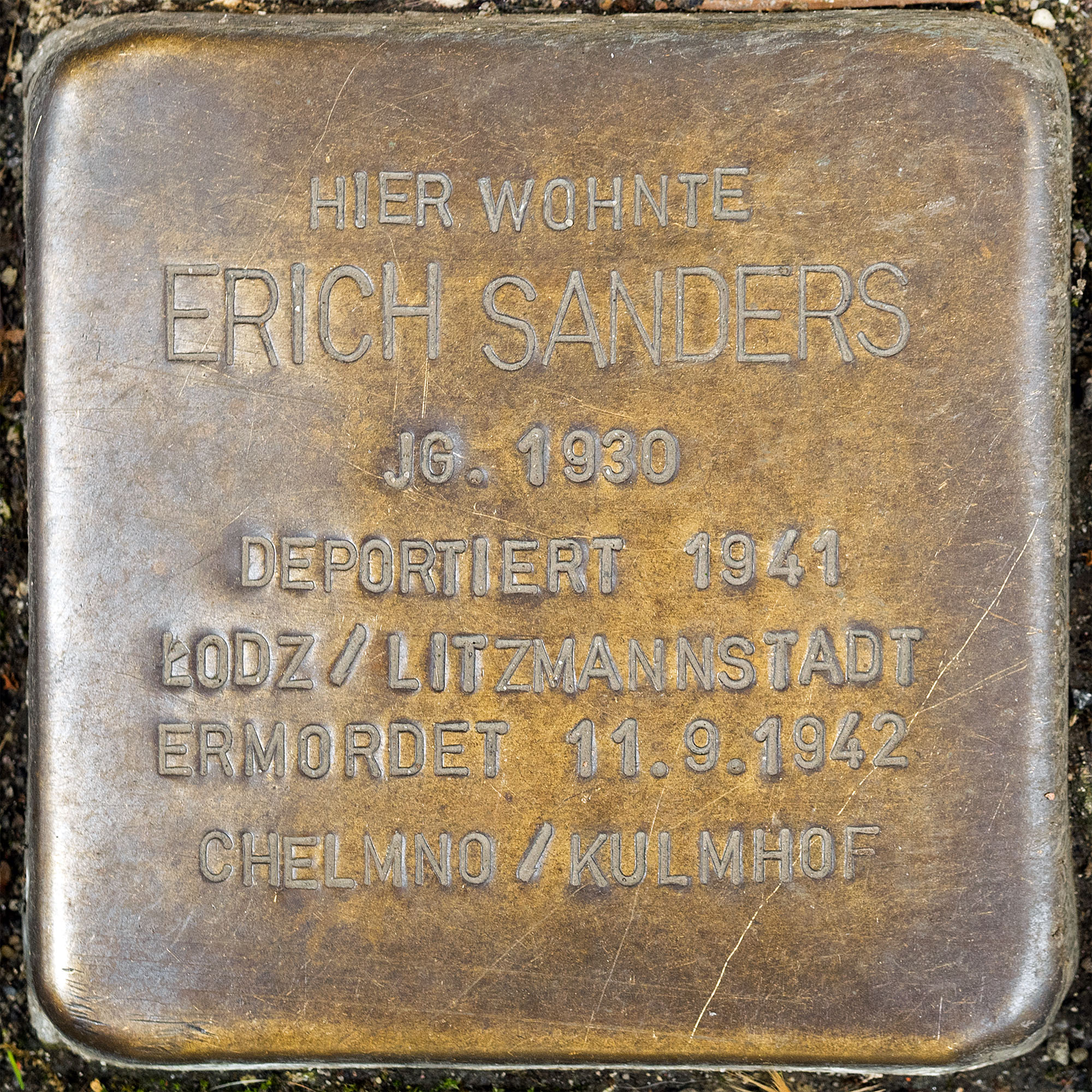 Stolpersteine Nettetal Sanders, Erich